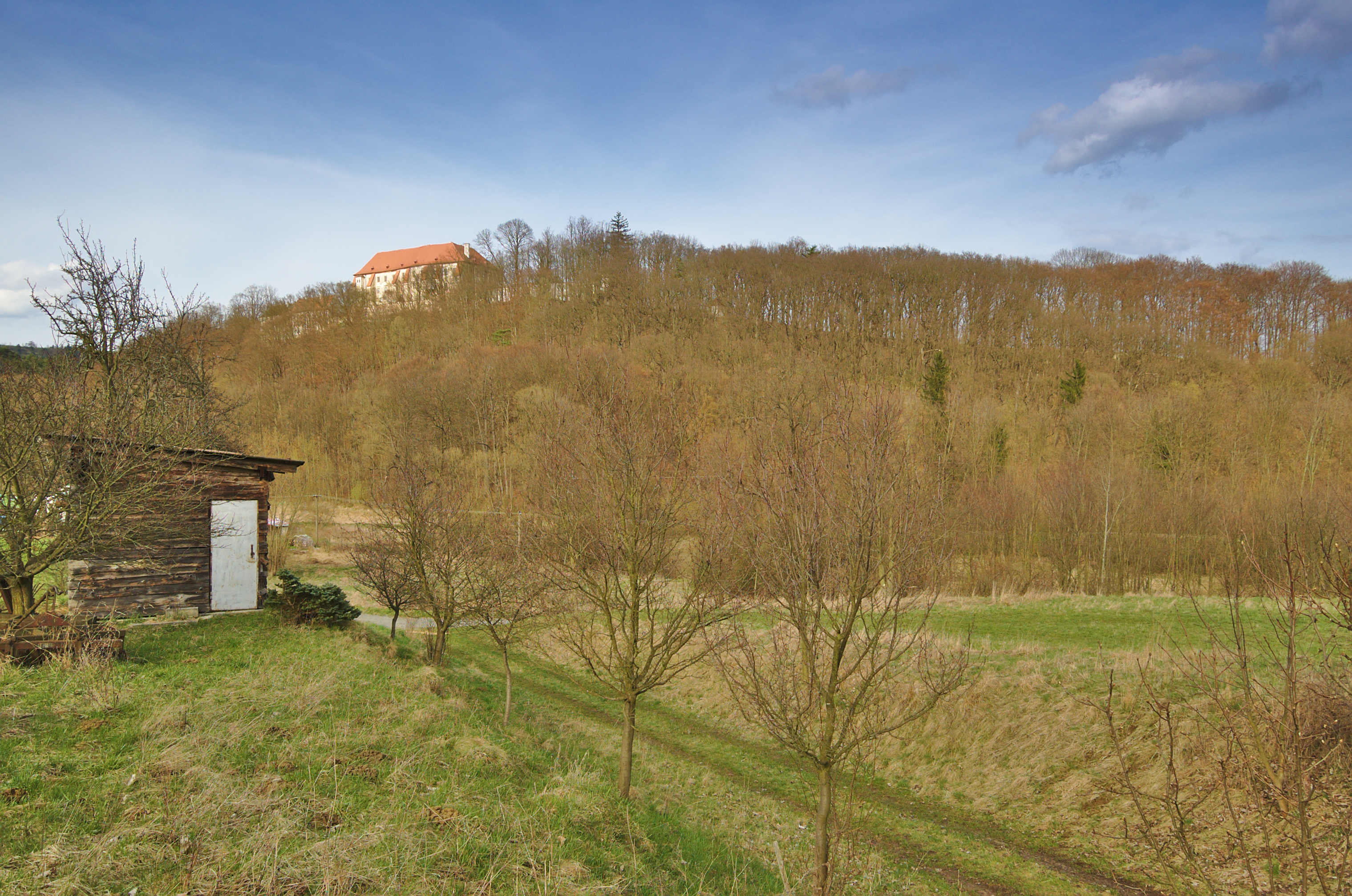 Celkový pohled na přírodní památku Kunštátská obora a zámek od jihozápadu, okres Blansko